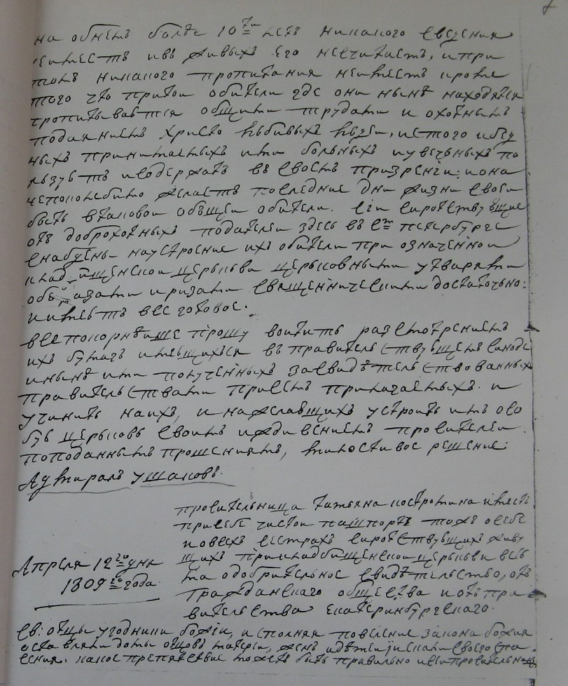 Из обращения адмирала Федора Ушакова в Синод о разрешении открыть Ново-Тихвинский женский монастырь 12 апреля 1809 года